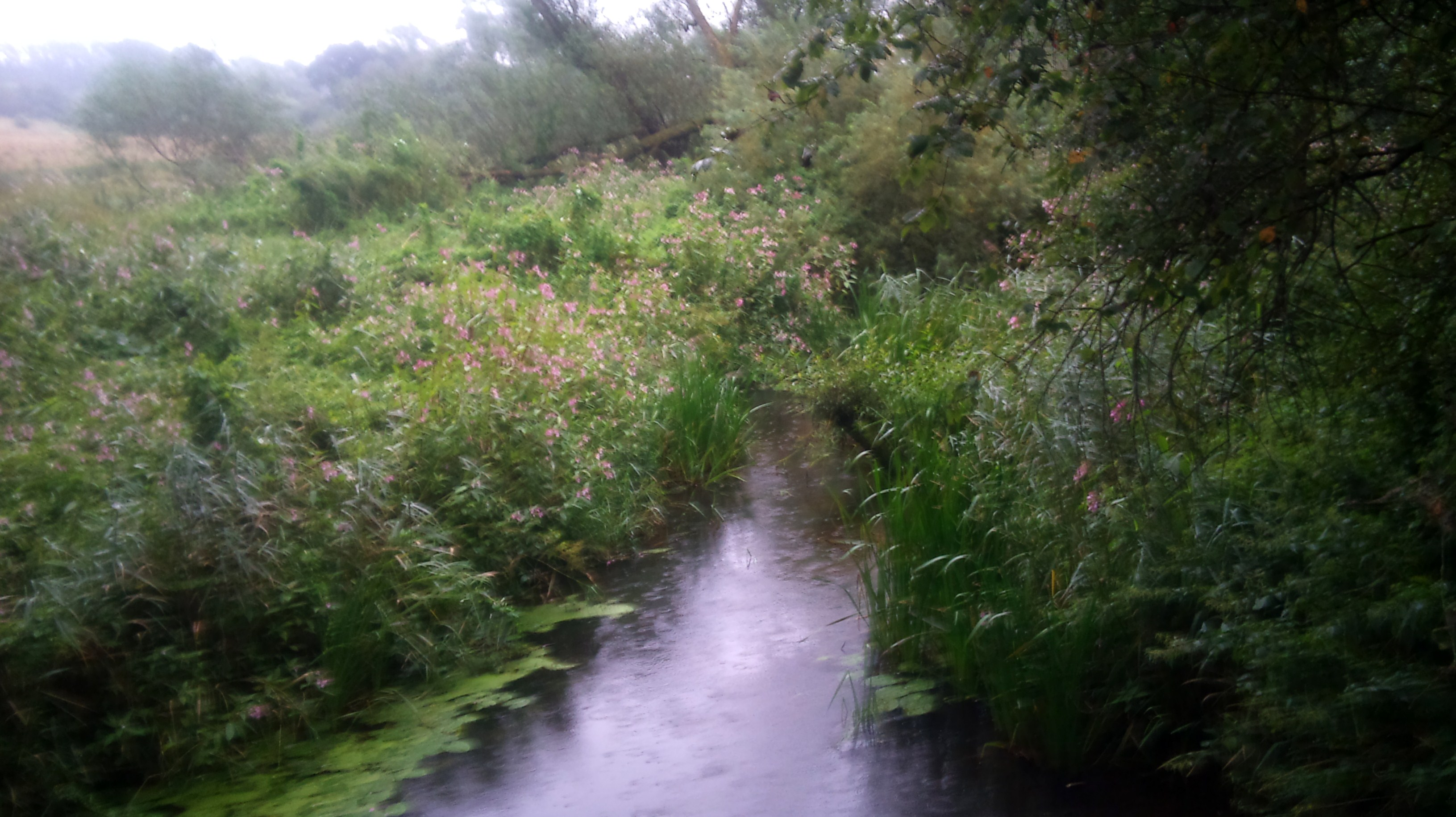 Råån